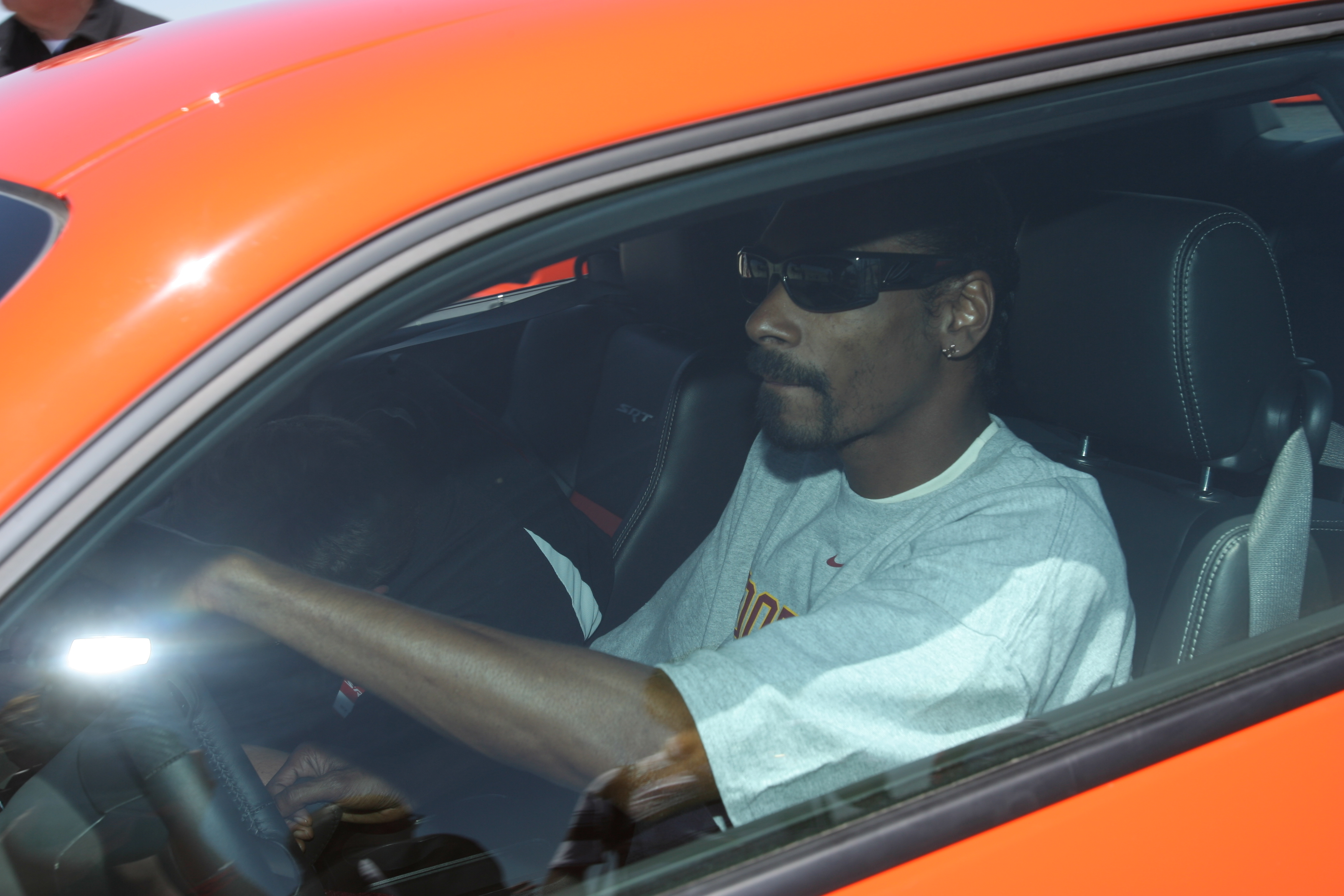 Snoop Dogg in HEMI Orange Dodge Challenger